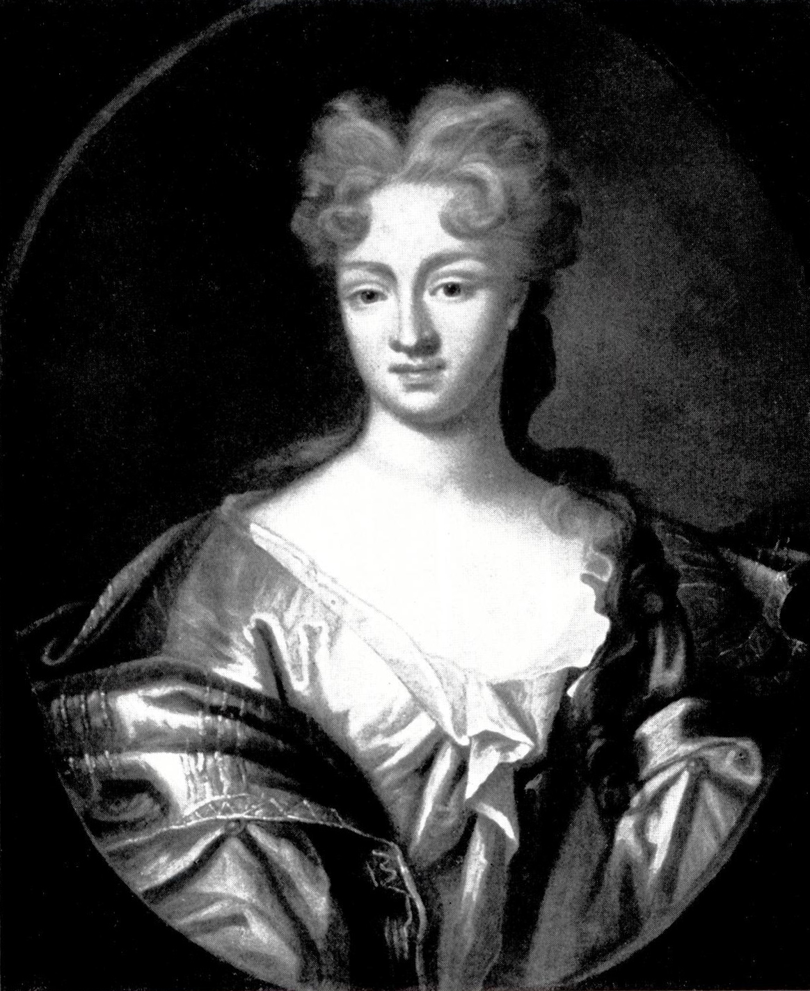 Eva Margarethe geborene von Trott zu Solz, Gattin von Jost Volprecht Riedesel zu Eisenbach (1663-1733)